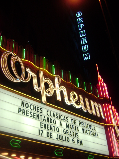 Marquesina de Teatro Orpheum (Los Angeles) - María Victoria